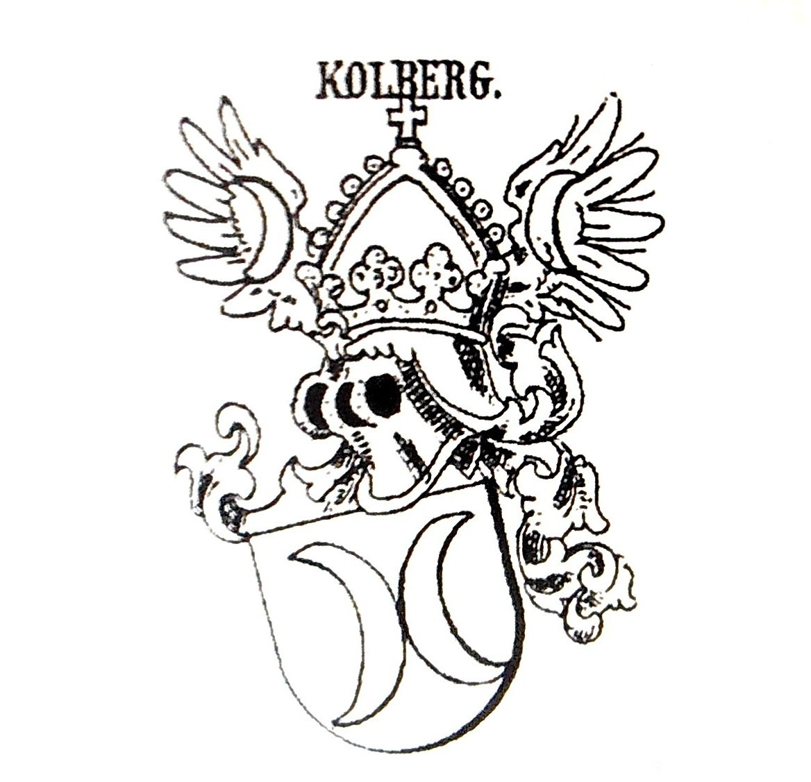 Wappen d. reichsunmittelbaren Freiherrn u. Grafen von Neuenkolberg, Erster Träger ohne Erben war Wolfgang Kolberger (geb. um 1445, gest. nach 1518), Freiherr u. Graf von Neuenkolberg